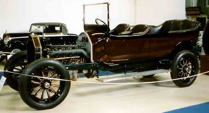 Pierce-Arrow vehicles Model 48-B-5 7-Passenger Touring 1919